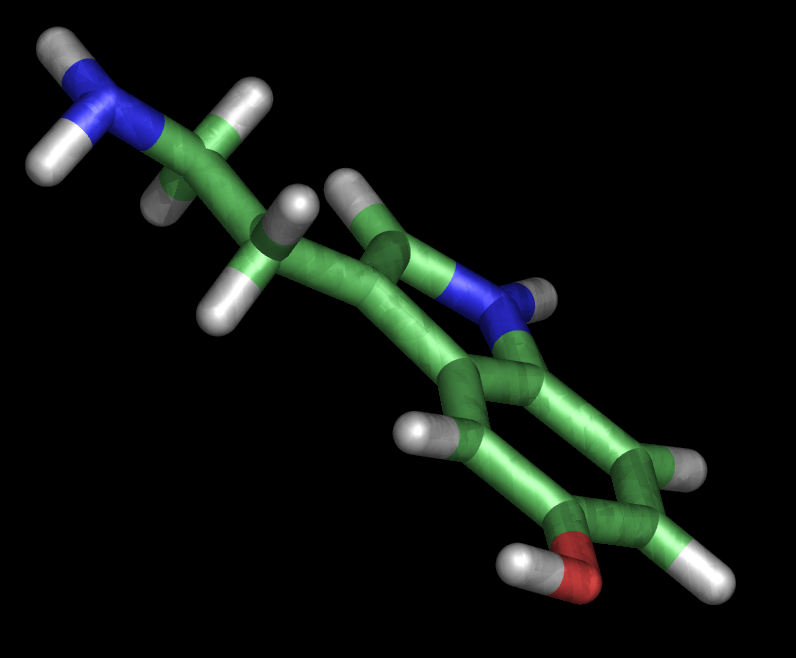 La molécule de sérotonine en 3D. Calculé sur mon PC (NetBSD) par le logiciel Pymol.